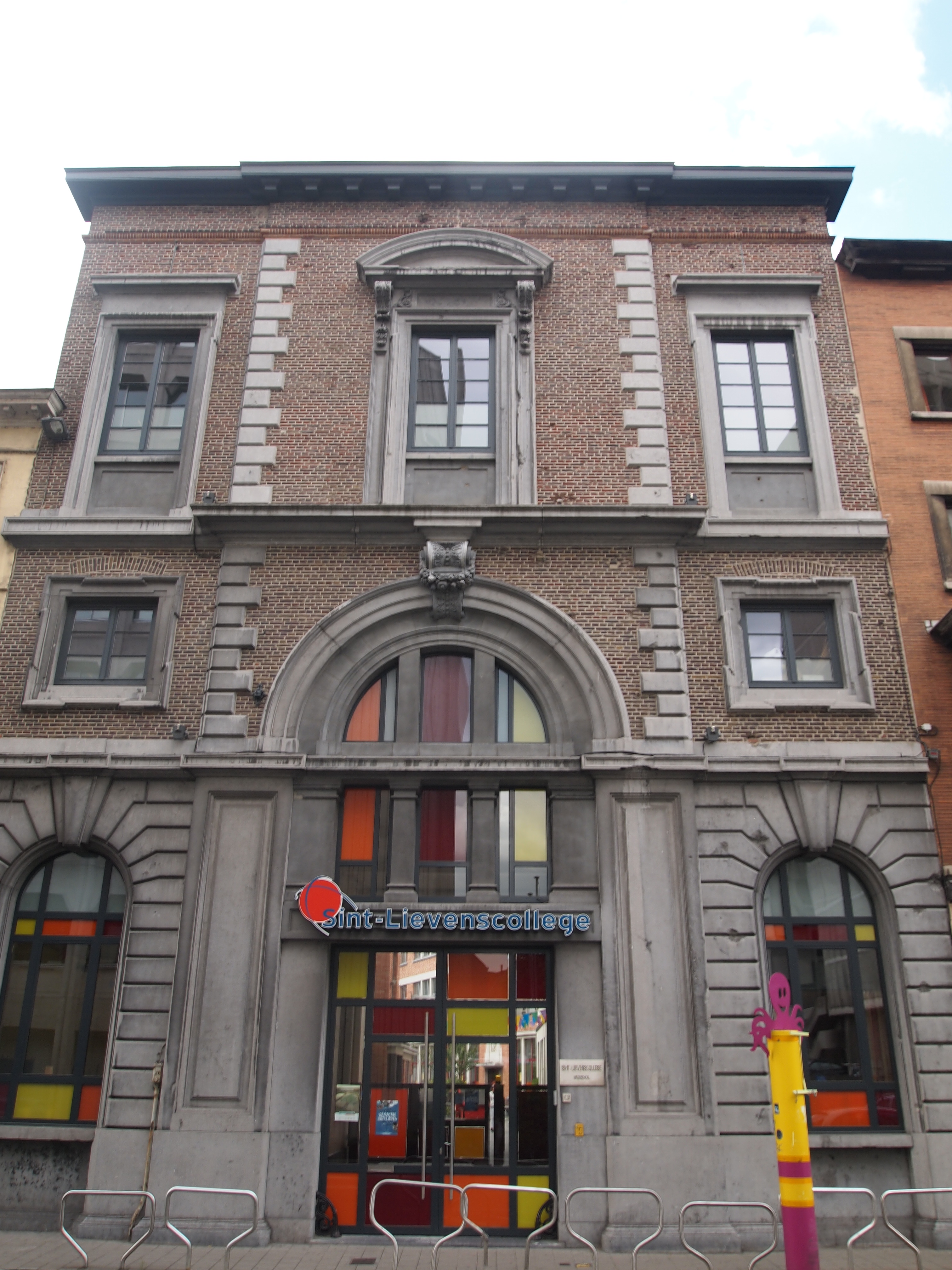 Voorheen woning en ere-ingang van de katoenspinnerij van Ferdinand Lousbergs, gebouwd in neoclassicistische stijl (bouwaanvraag 1850). Thans lagere school van het Sint-Lievenscollege